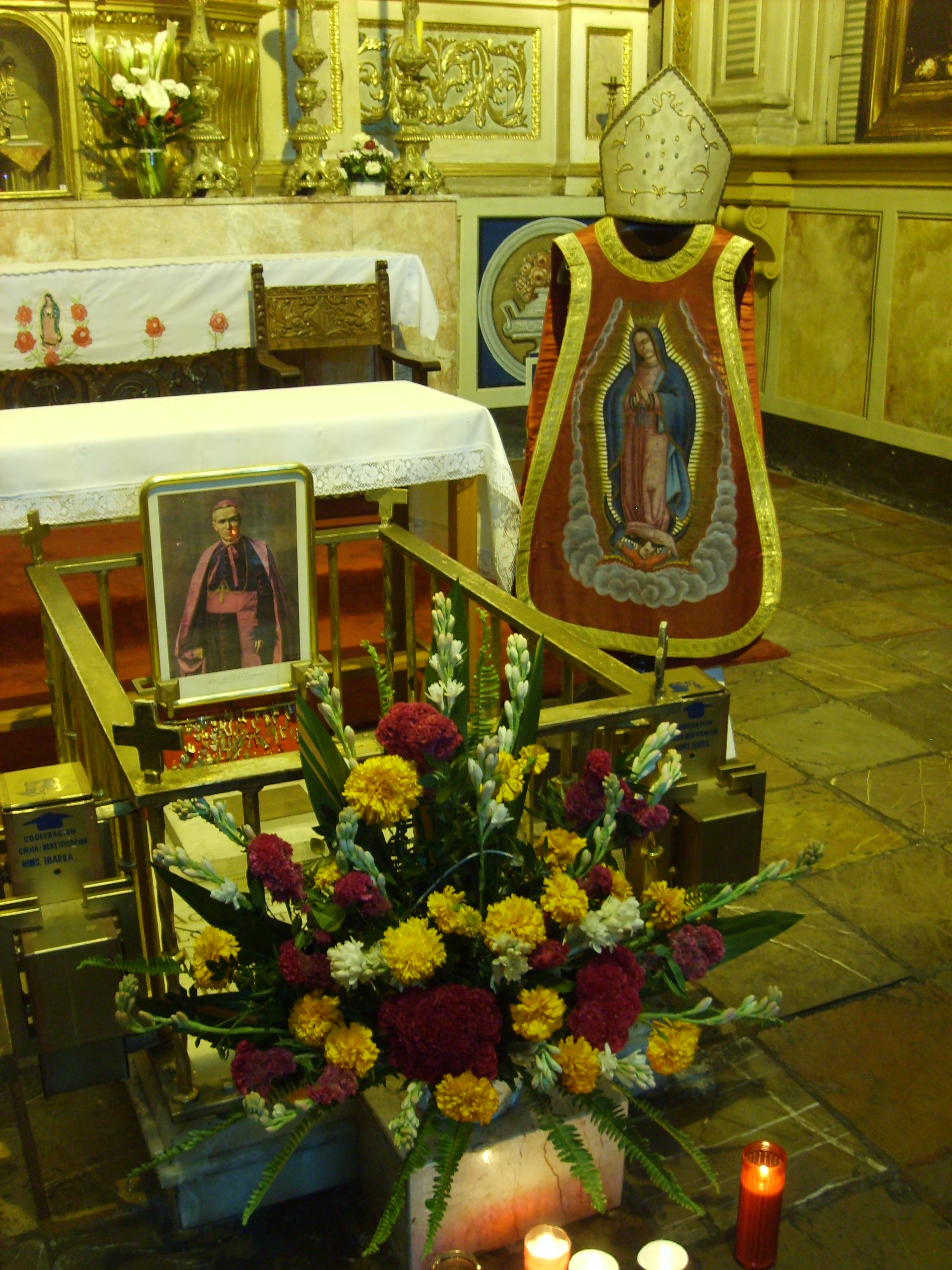 Vestiduras de Ramón Ibarra Y González en la Capilla de Guadalupe en la Catedral de Puebla